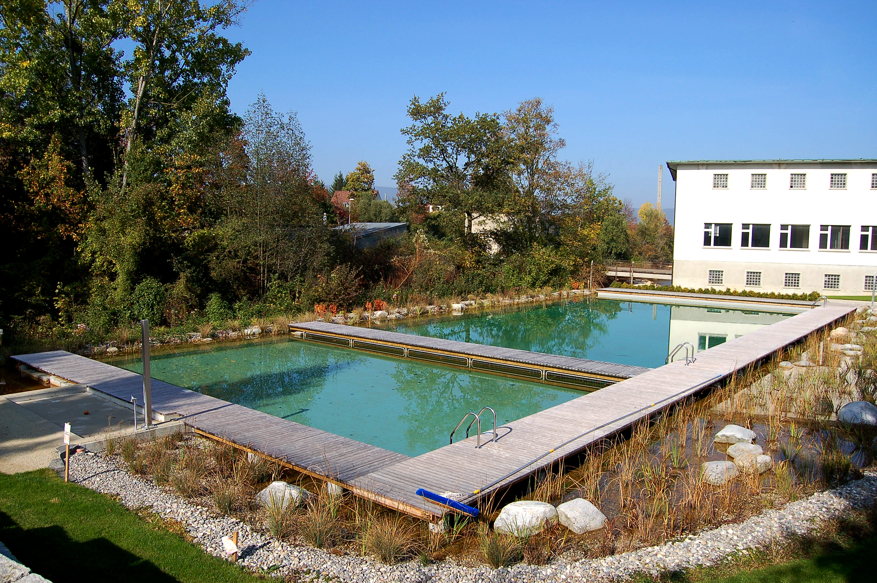 Naturbadeteich Breitenbach öffentliche Badi